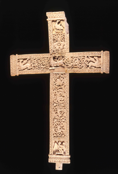 Crucifijo de don Fernando y doña Sancha (Románico). Número de inventario: 52340.